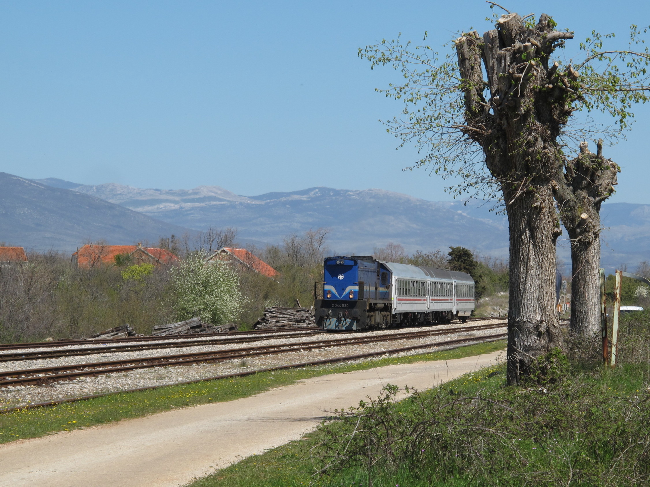 Zug mit HŽ 2044 030 in Kistanje